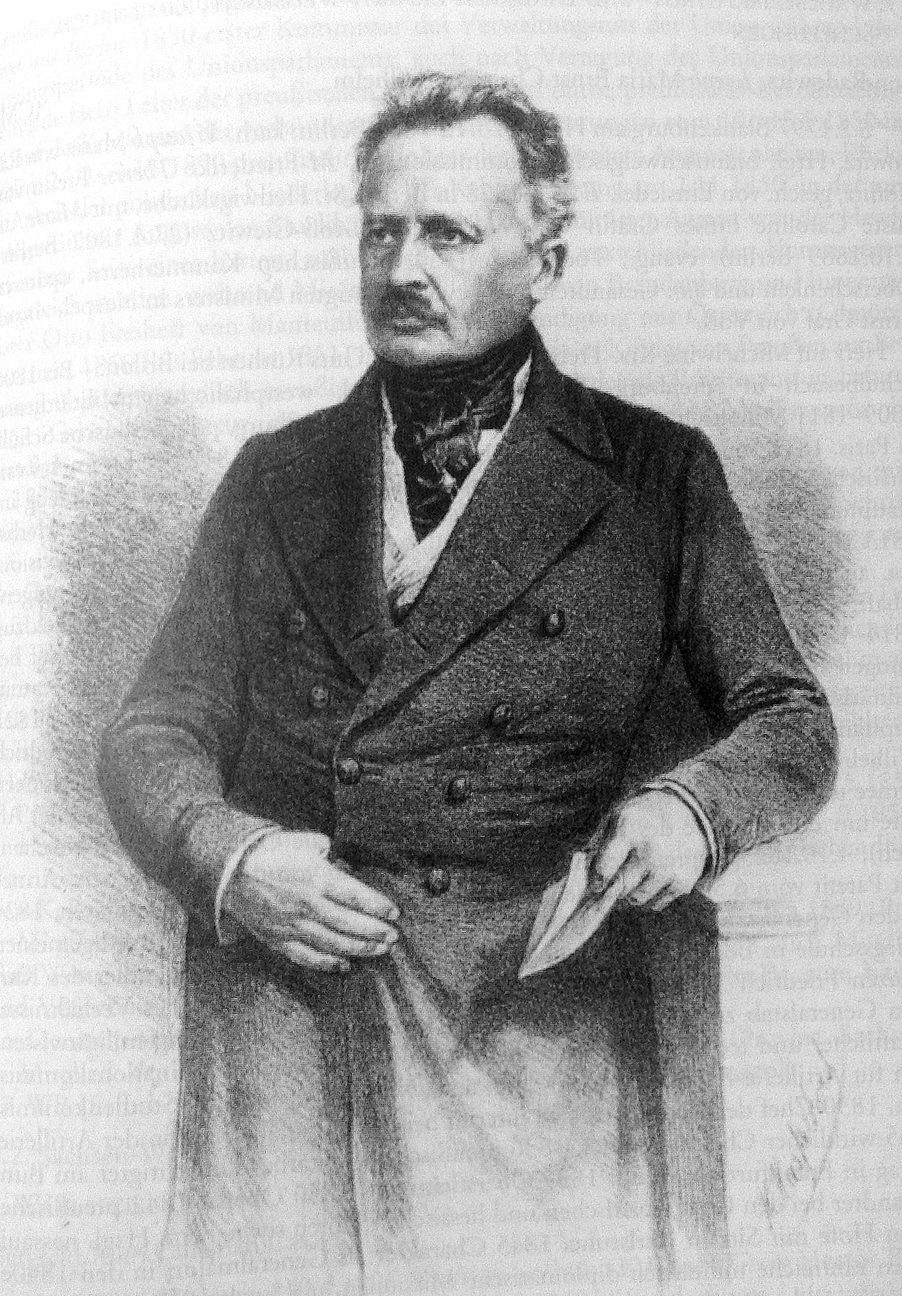 Joseph Maria Radowitz.